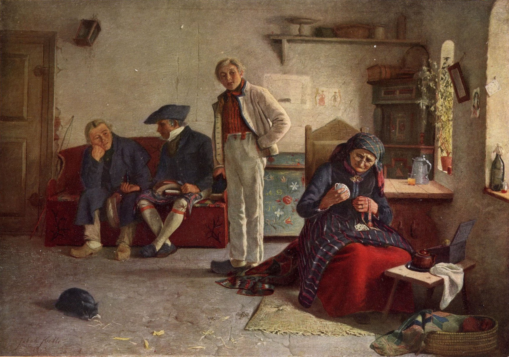 Hos kloka gumman. Oljemålning. En klok gumma eller spåkvinna vill försöka att med tillhjälp av kort och kaffesump förutsäga en ung mans framtid; denne står bakom sibyllan under spänning väntande få höra sitt öde. Tvenne gubbar äro även på besök hos den gamla och ha slagit sig ned på gummans soffa, men tyckas ha något att förhandla sinsemellan. Den ene av dem har över knäna brett ut en storblommig snusnäsduk, på vilken ligger en halv limpa och, som det tyckes, ett bra stycke fett fläsk. Att vara en anlitad klok gumma är rätt givande. Gumman äger tydligen ett bra bohag, och stugan saknar ej heller dyrbara textilier. Och vad den stora blåmålade kistan inrymmer av dyrbarheter, kan ingen veta. Golvet är dock av det enklare slaget, d. v. s. av tillstampad lerjord. - Gerda Cederblom